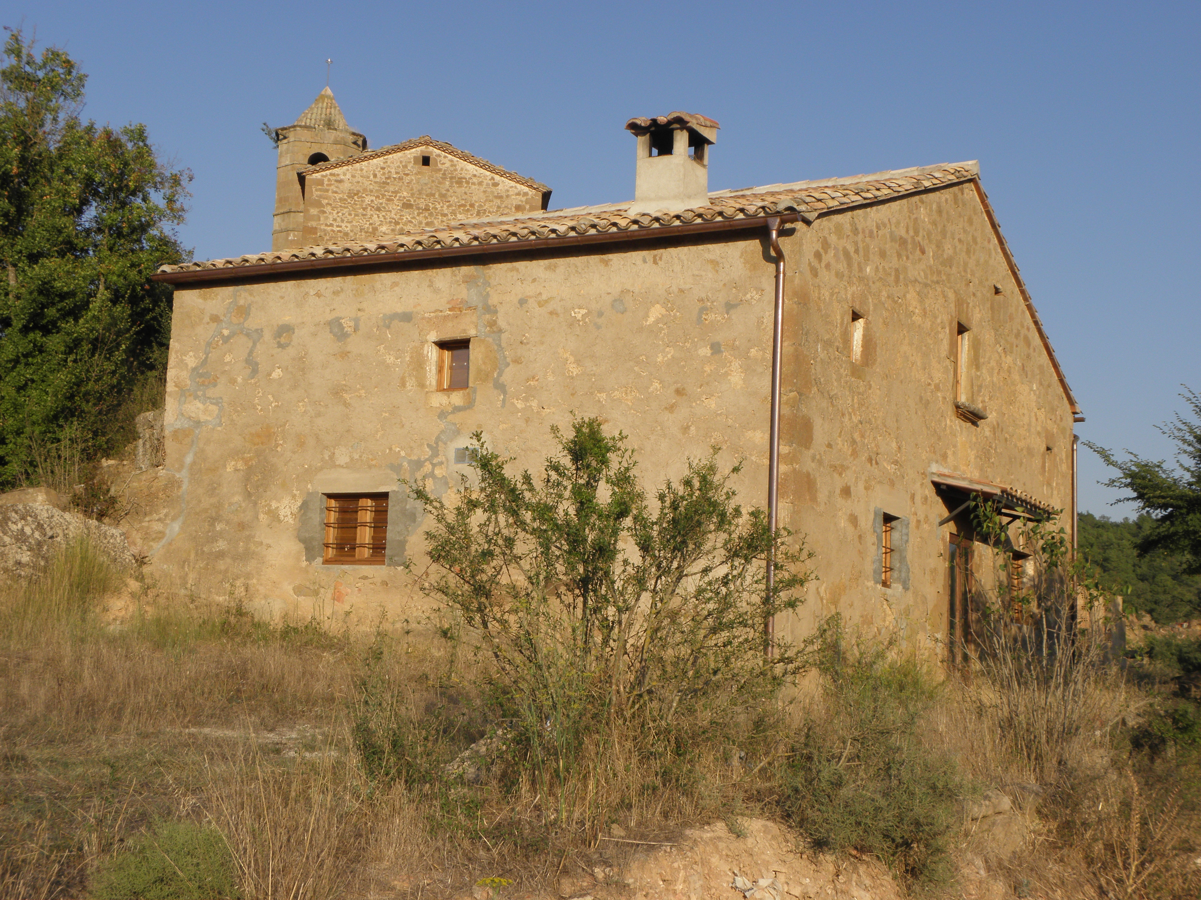 Casa del nucli de Madrona (Pinell de Solsonès).